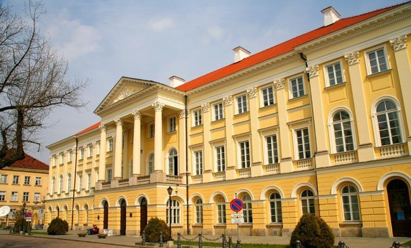 Warszawa (Polska)